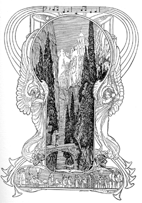 an image by Franz Stassen